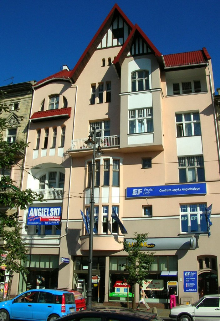 Kamienica ul. Gdańska 34 w Bydgoszczy